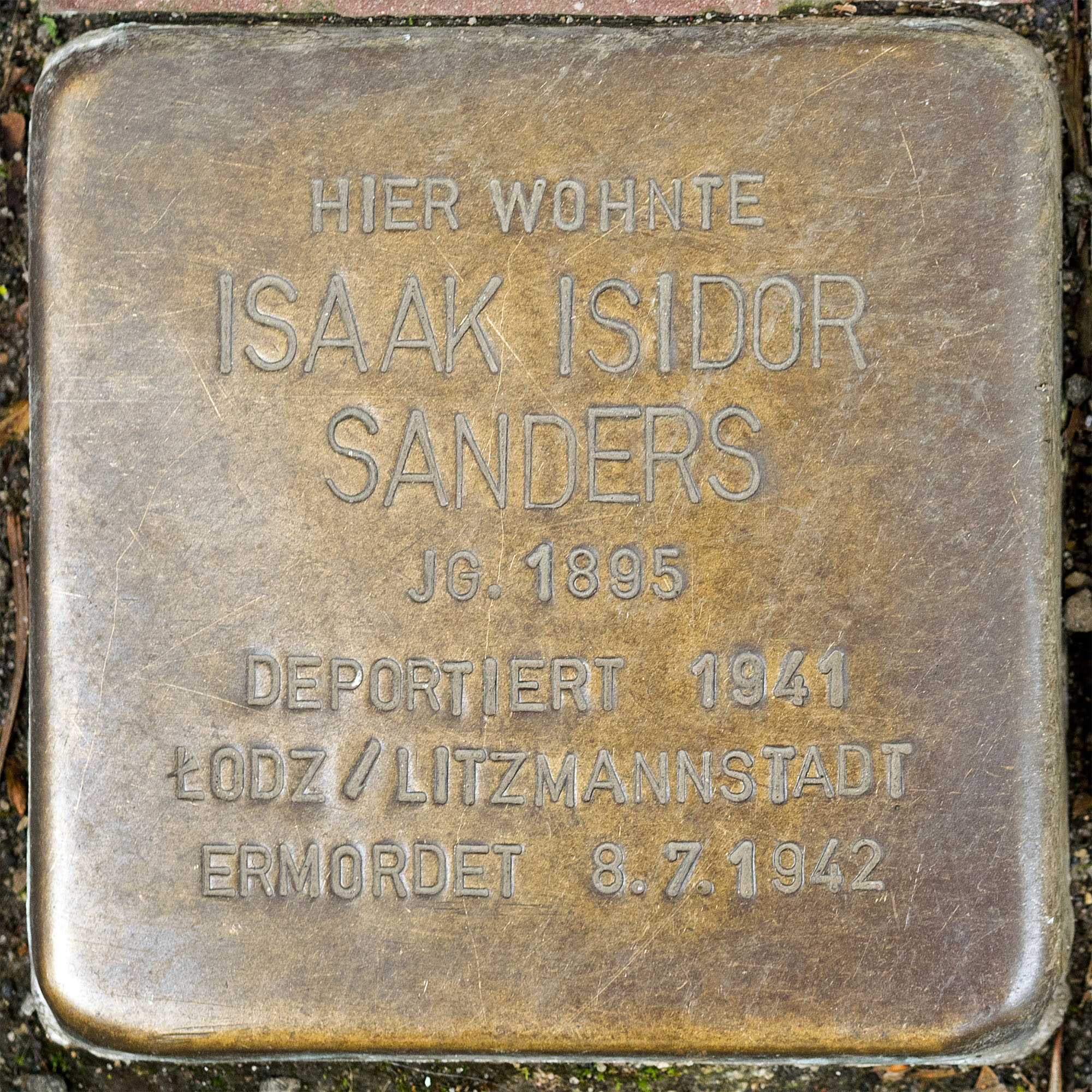 Stolpersteine Nettetal Sanders, Isaak Isidor